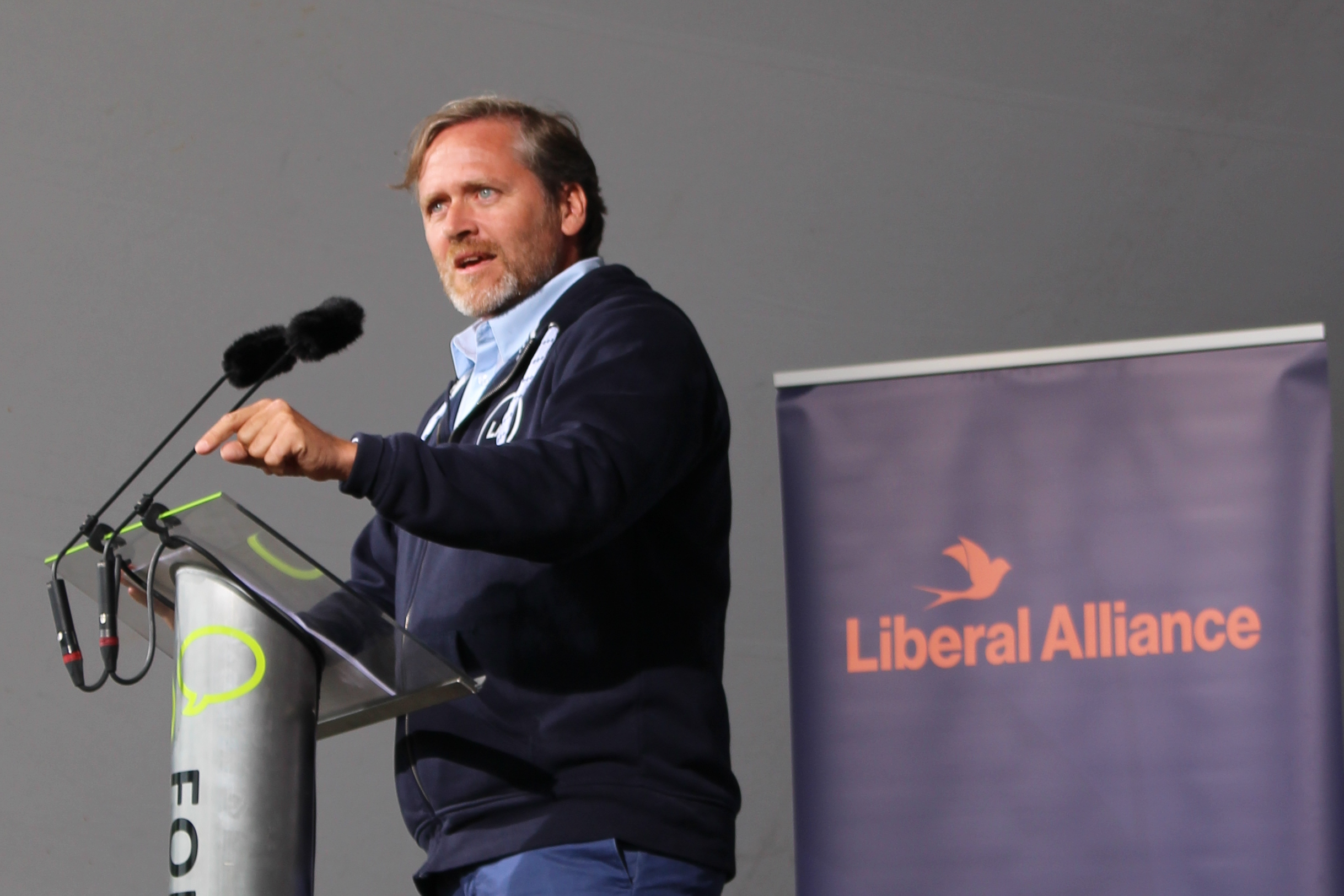 Partileder for Liberal Alliance taler under Folkemødet 2016 fra hovedscenen.